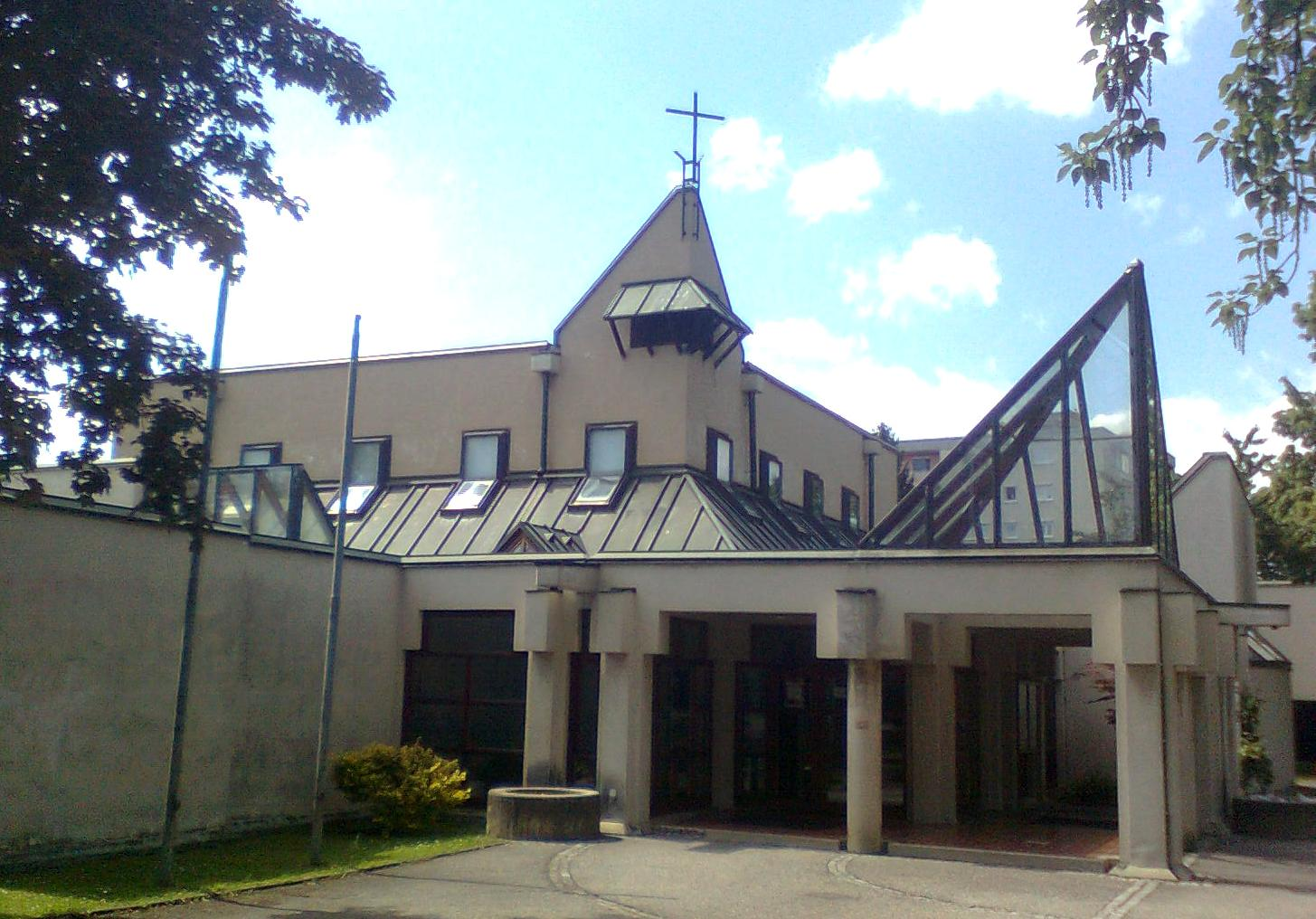 Grazer Salvatorkirche von außen